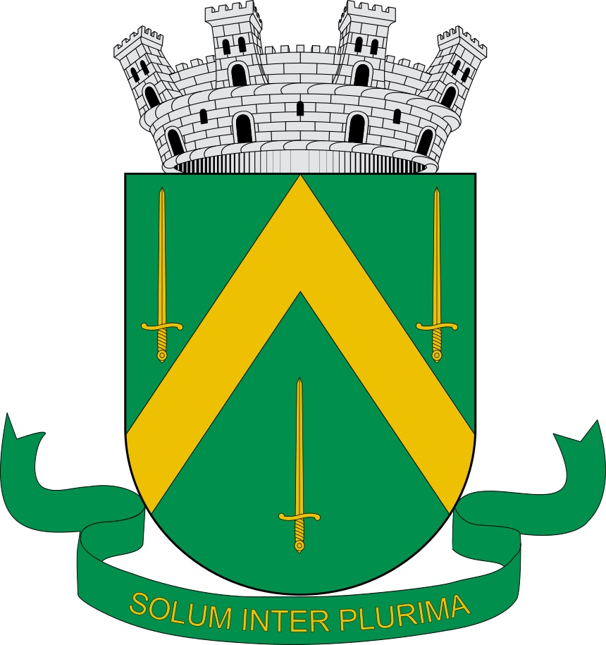 Brasão de Armas do Município de Campina Grande no Estado da Paraíba, Brasil.